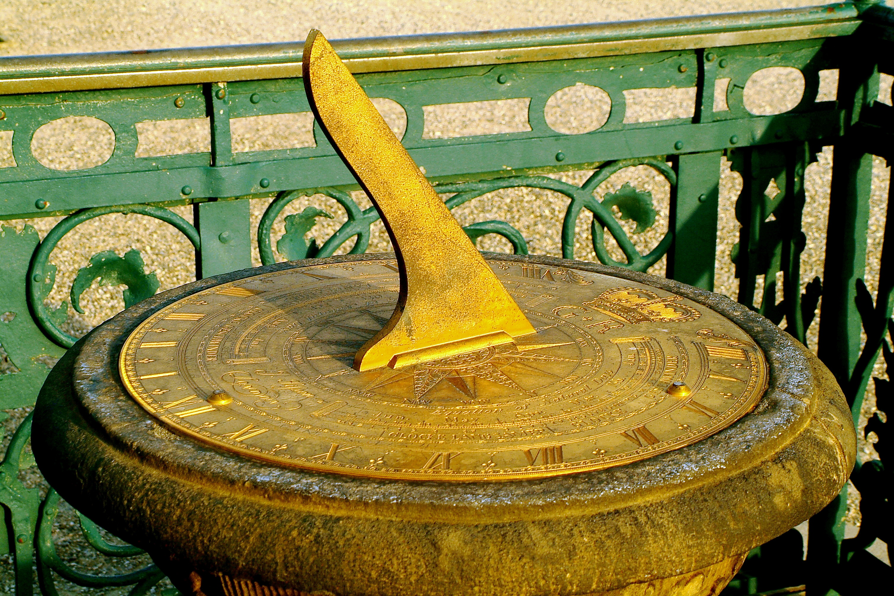 Sie haben bessere Bilder? Sogar ältere? Zeigen Sie' s uns. Allen.